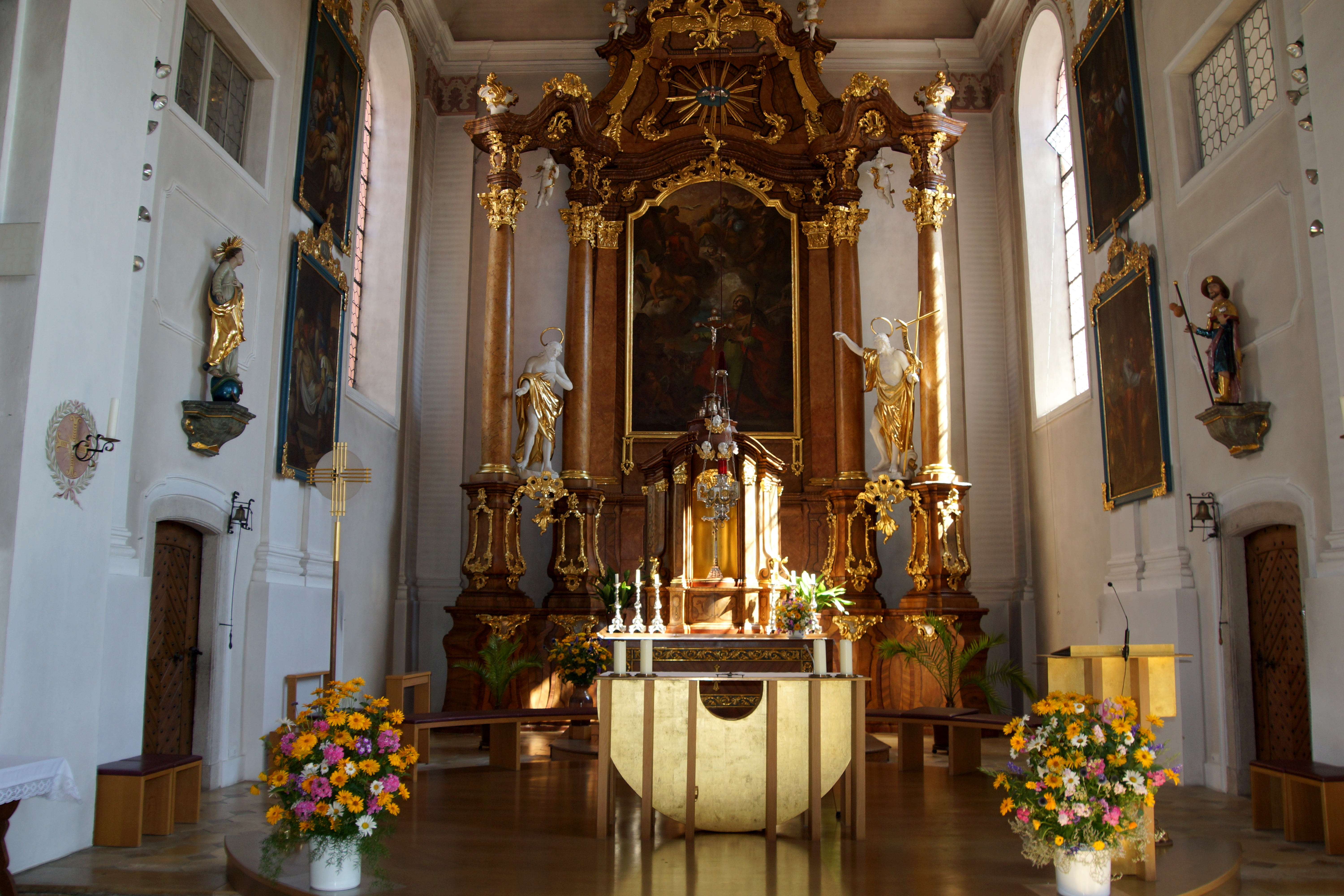 Die katholische Pfarrkirche St. Jakobus in Greding